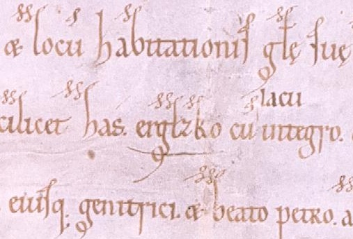 AGAD Fundacja klasztoru cystersów w Łeknie 1115